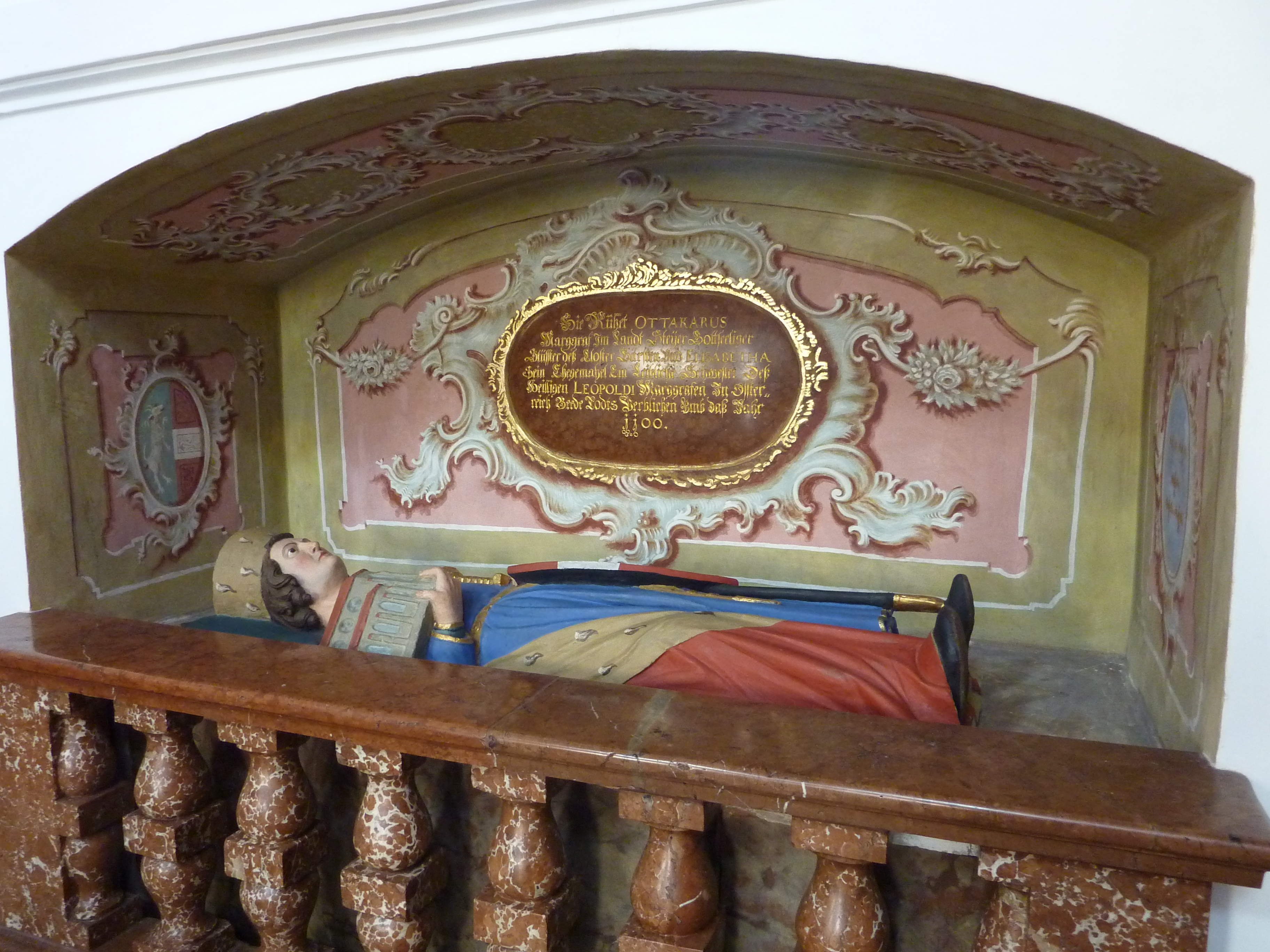 Kath. Pfarrkirche Mariä Himmelfahrt, ehem. Klosterkirche, Am Platzl, Garsten, Oberösterreich - Hochgrab von Ottokar II. von Steyr und seiner Gattin Elisabeth (Figur aus Steinguss um 1347 mit einem Modell der alten Klosterkirche Garsten) in der ersten Seitenkapelle links